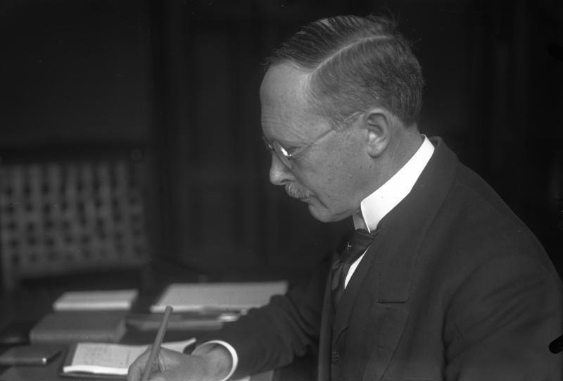 Die Amtseinführung des neuen stellv. Reichspräsidenten Dr. Walter Simons wurde am 12. März 1925 durch den Reichstagspräsidenten Löbe im Reichstag vorgenommen. Neueste Aufnahme des stellv. Reichspräsidenten in seinem Arbeitszimmer im Reichspräsidenten-Palais. Der stellv. Reichspräsident am Arbeitstisch beim Unterzeichnen eines Schriftstückes. Die Aufnahme wurde eine Stunde vor dem Amtsantritt vorgenommen.